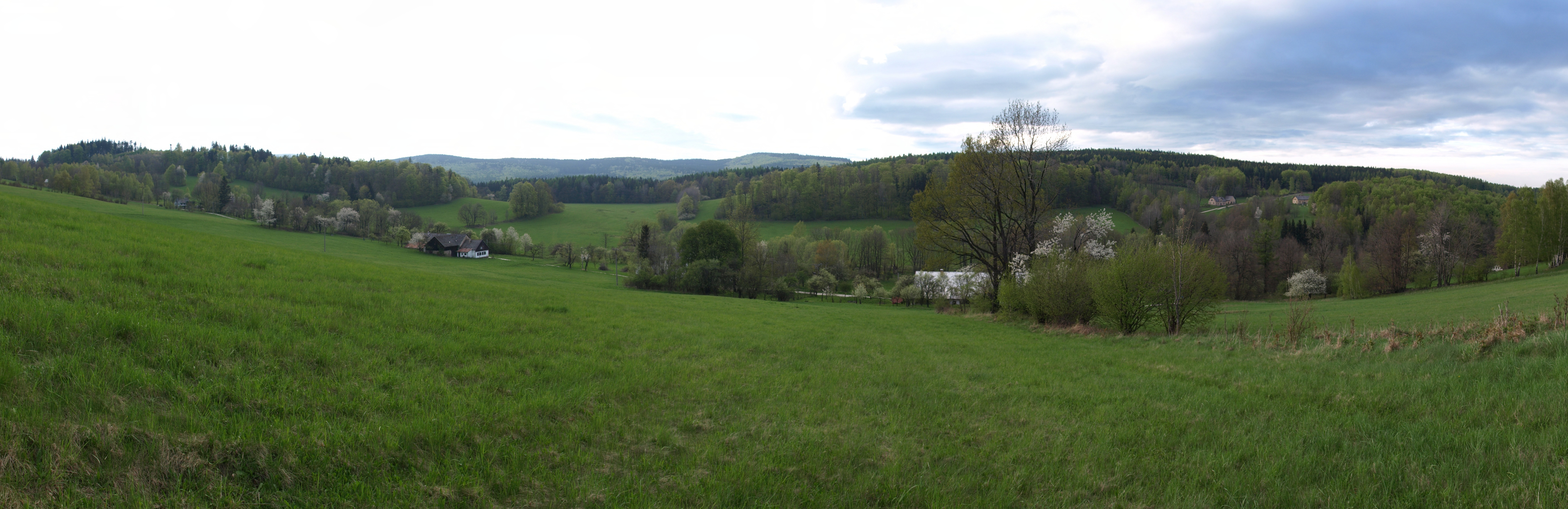 panorama Červeného Dolu